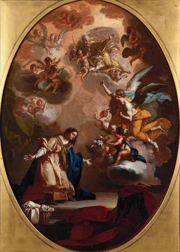 Annunciazione